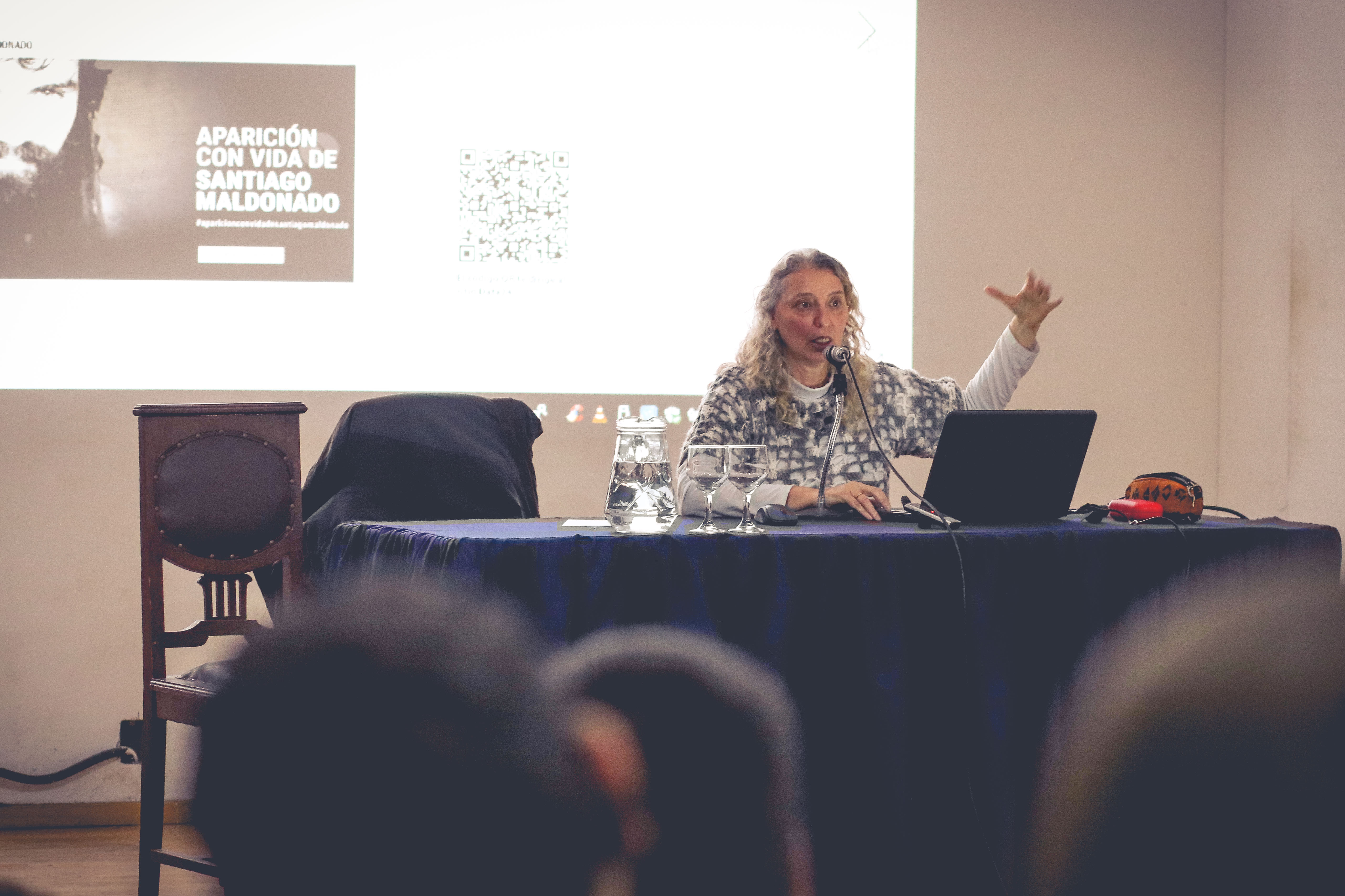 Cora Gamarnik - Conferencia central de la actividad "Hackear la calle" realizada en Paraná, Entre Ríos, entre la Cooperativa Cultural Antílope y la Facultad de Ciencias de la Educación de la Universidad Nacional de Entre Ríos. Junio de 2019. Algunas de estas imágenes pueden aparecer en la nota periodística "Cora Gamarnik: “Hay imágenes tan poderosas que pueden cambiar la historia”"de la Facultad de Ciencias de la Educación - UNER